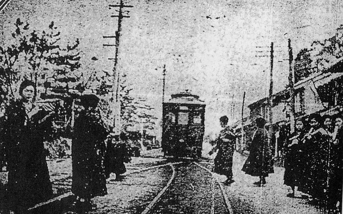 戦前の広貫堂前停留場（『富山日報』1919年（大正8年）2月22日）